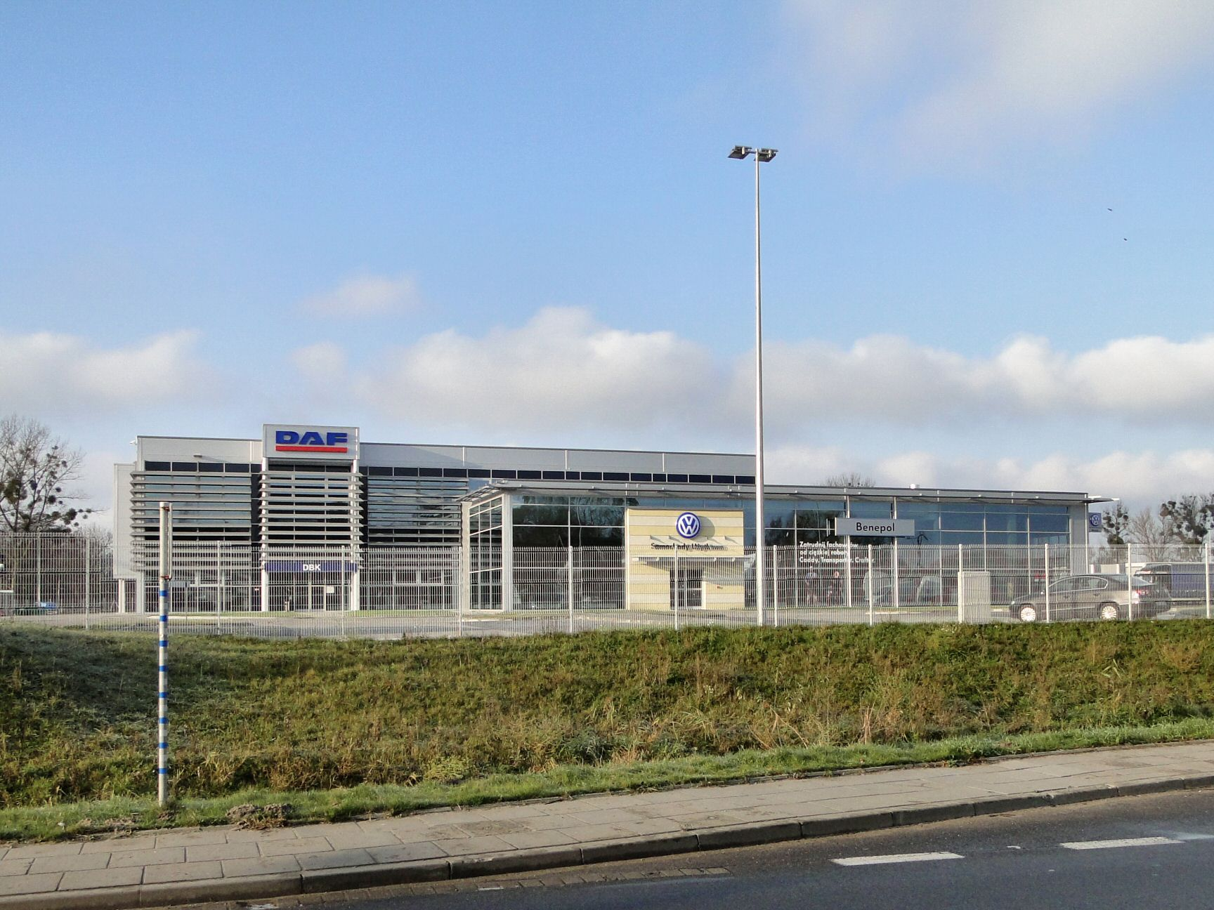 Radziszewo (powiat gryfiński)